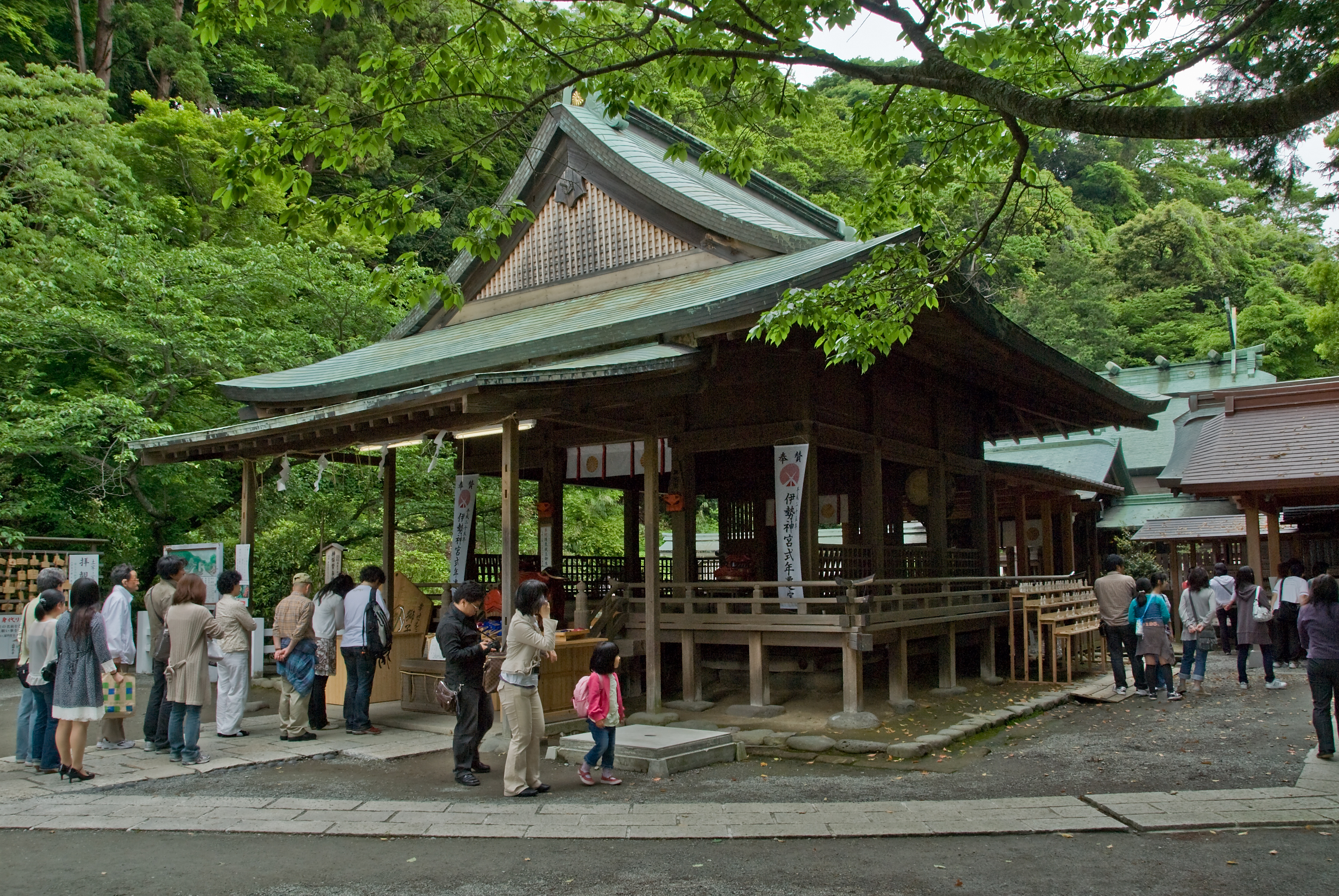 The oratory at Kamakura-gū shrine, Kamakura